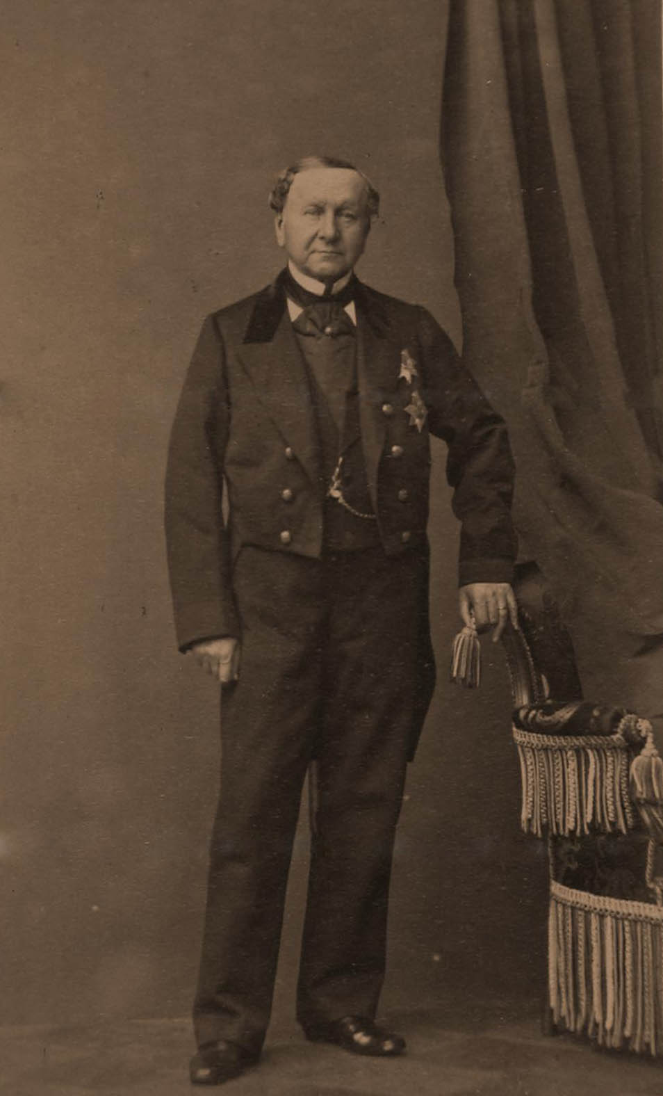 Шувалов Андрей Петрович (1802-1873) - граф, обер-гофмаршал.